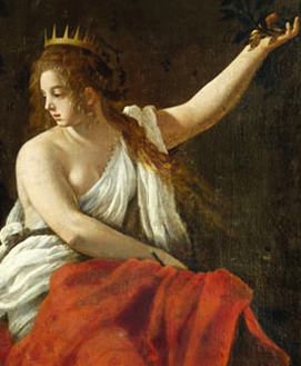 195 × 150 cm